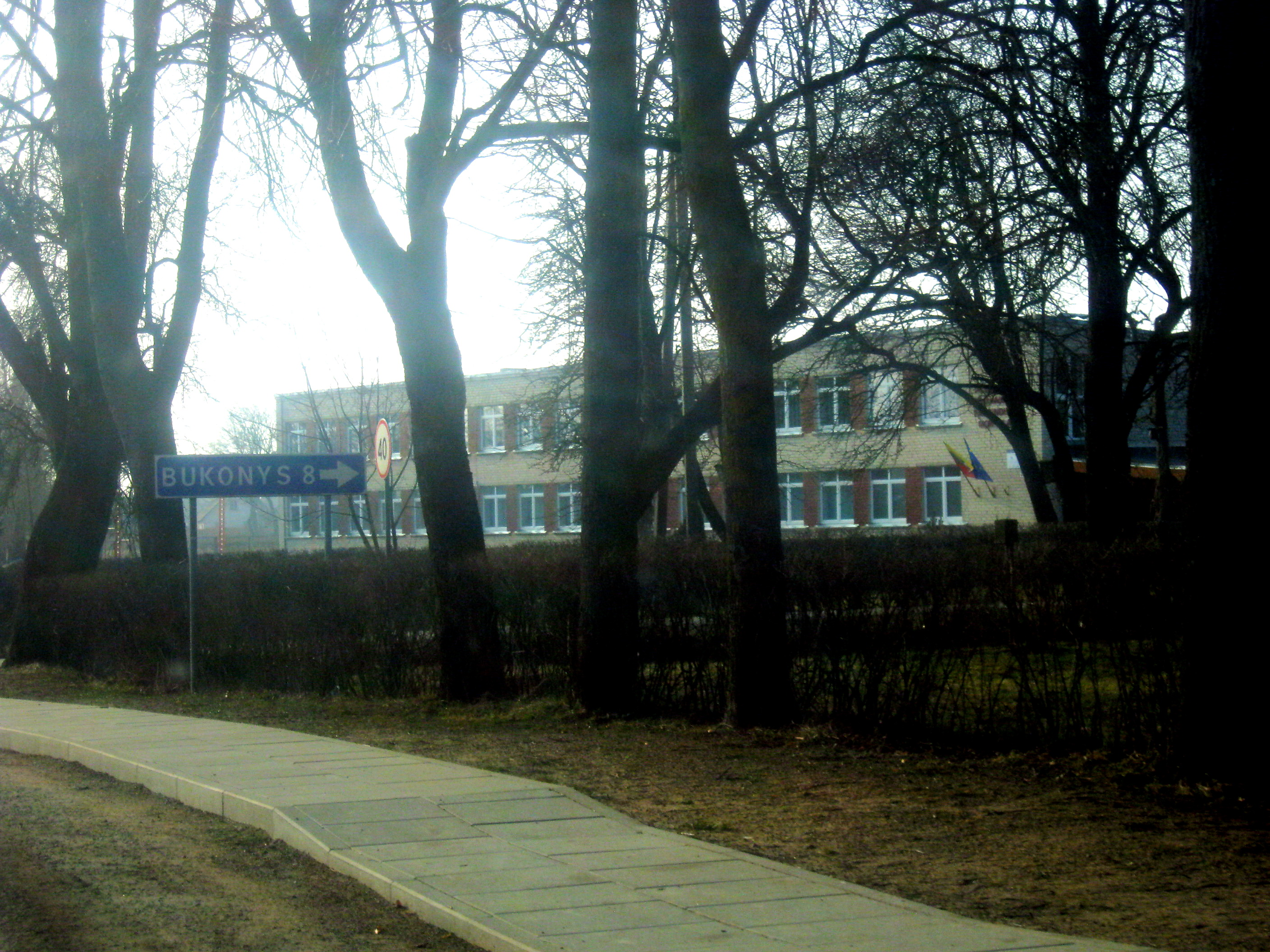 Panoterių Petro Vaičiūno pagrindinė mokykla